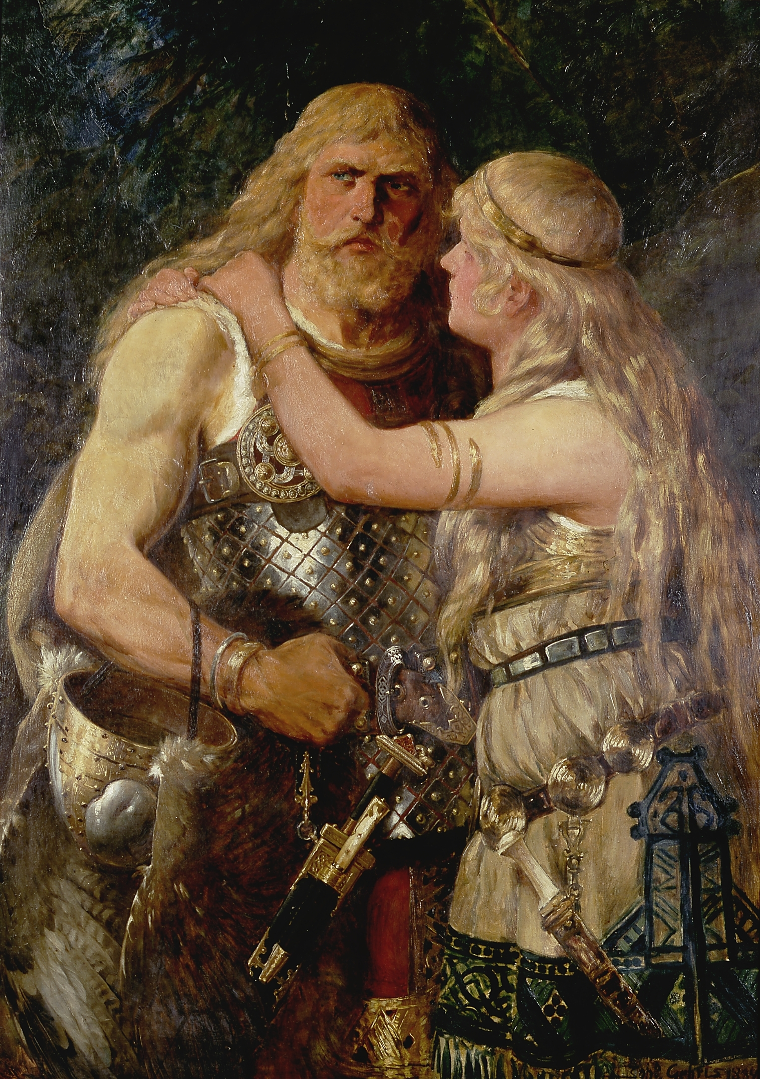 Johannes Gehrts: Armin verabschiedet sich von Thusnelda, 1884 (Lippisches Landesmuseum Detmold)